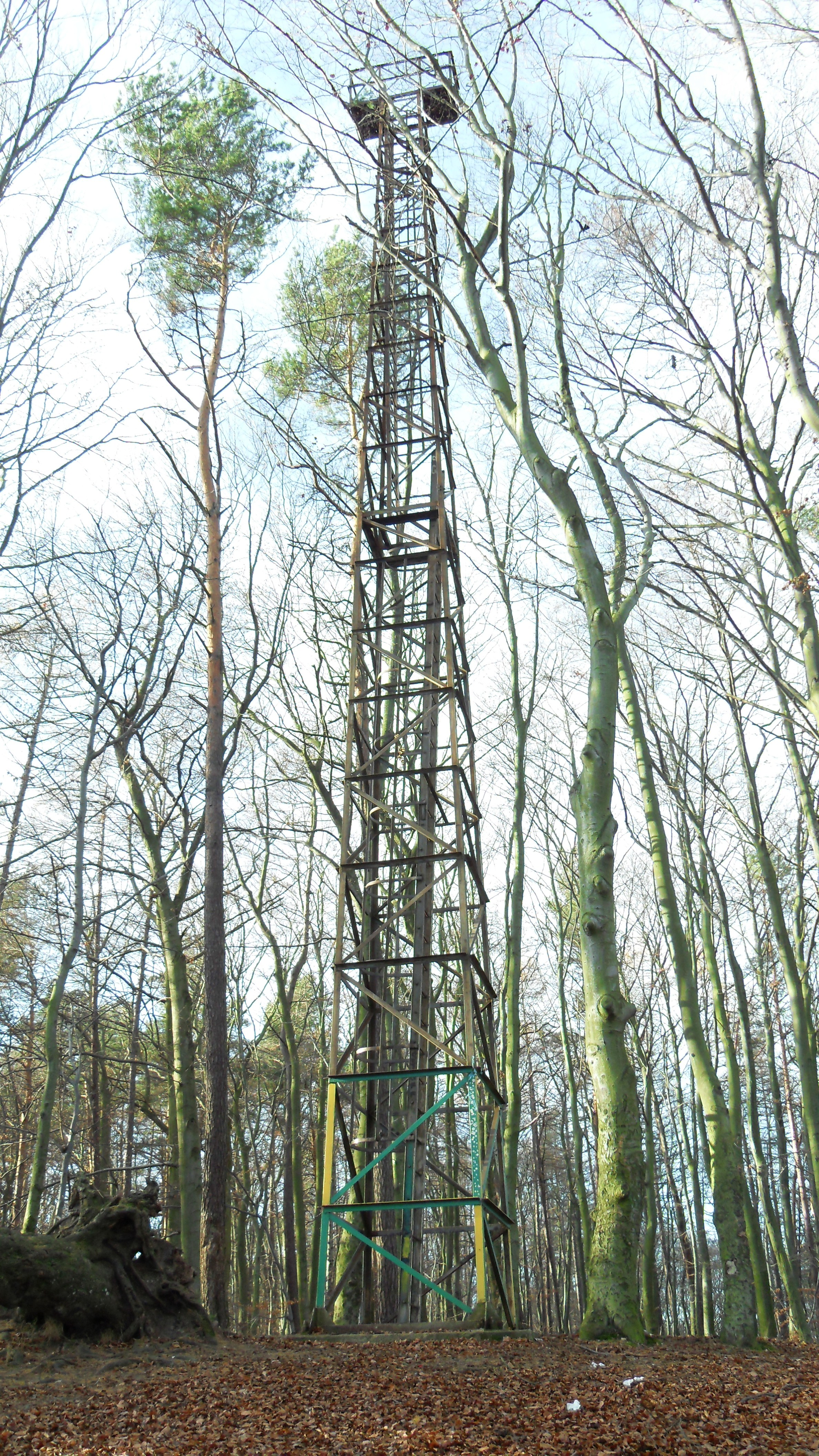 Stalowa wieża na wzniesieniu Głowica (zwanym również Wzgórzem Trzech Panów) w Gdańsku Oliwie.